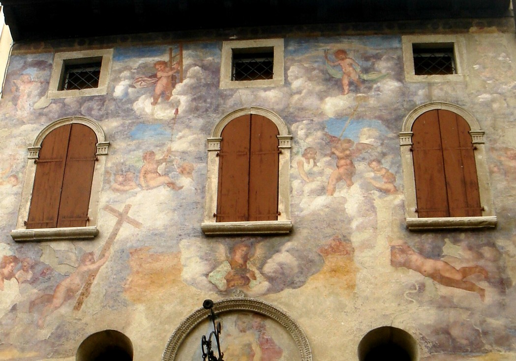 Conegliano (Treviso): particolare della facciata del Monte di Pietà (XVI secolo), con affreschi del Fiumicelli.